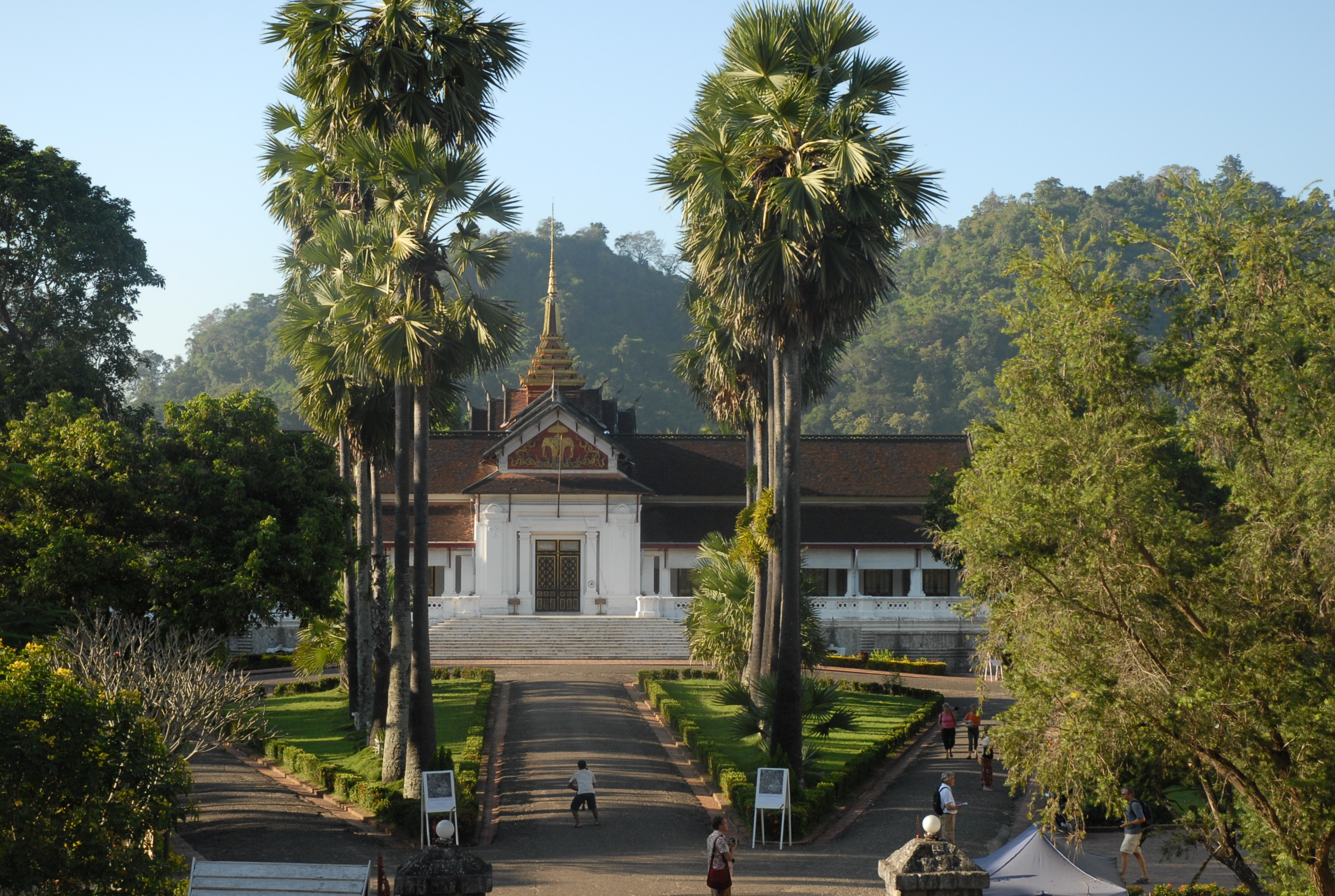 Luang Prabang : Musée national (ancien palais royal) depuis la colline de Phou Si